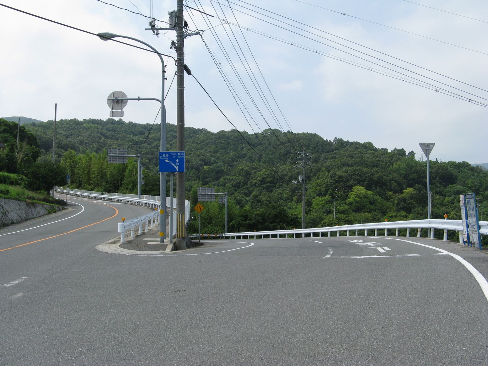 屋形崎でja:香川県道26号土庄福田線（左）に合流するja:香川県道253号屋形崎小江渕崎線（右）